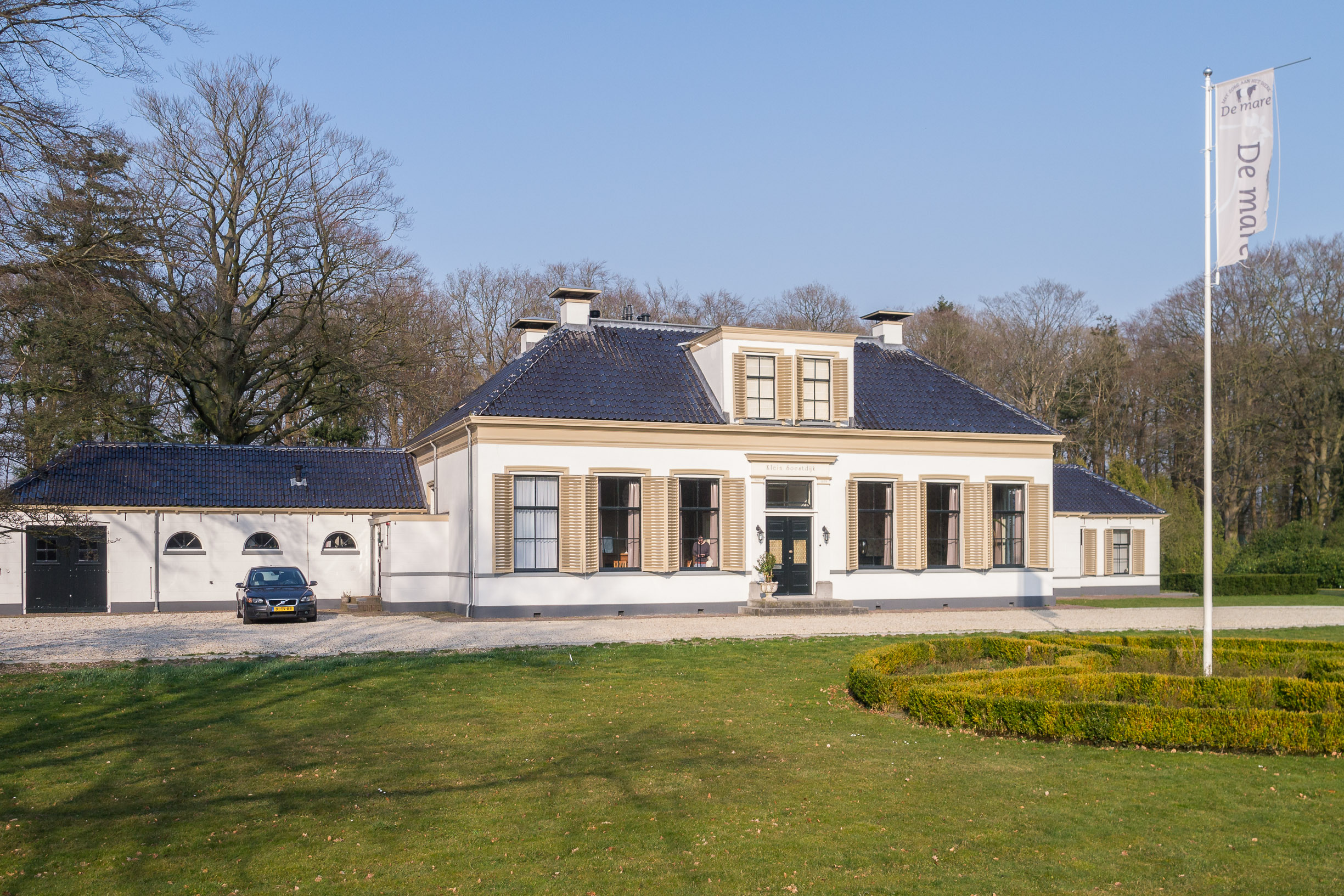 Directeurswoning strafkolonie Veenhuizen (bijnaam: Klein Soestdijk)